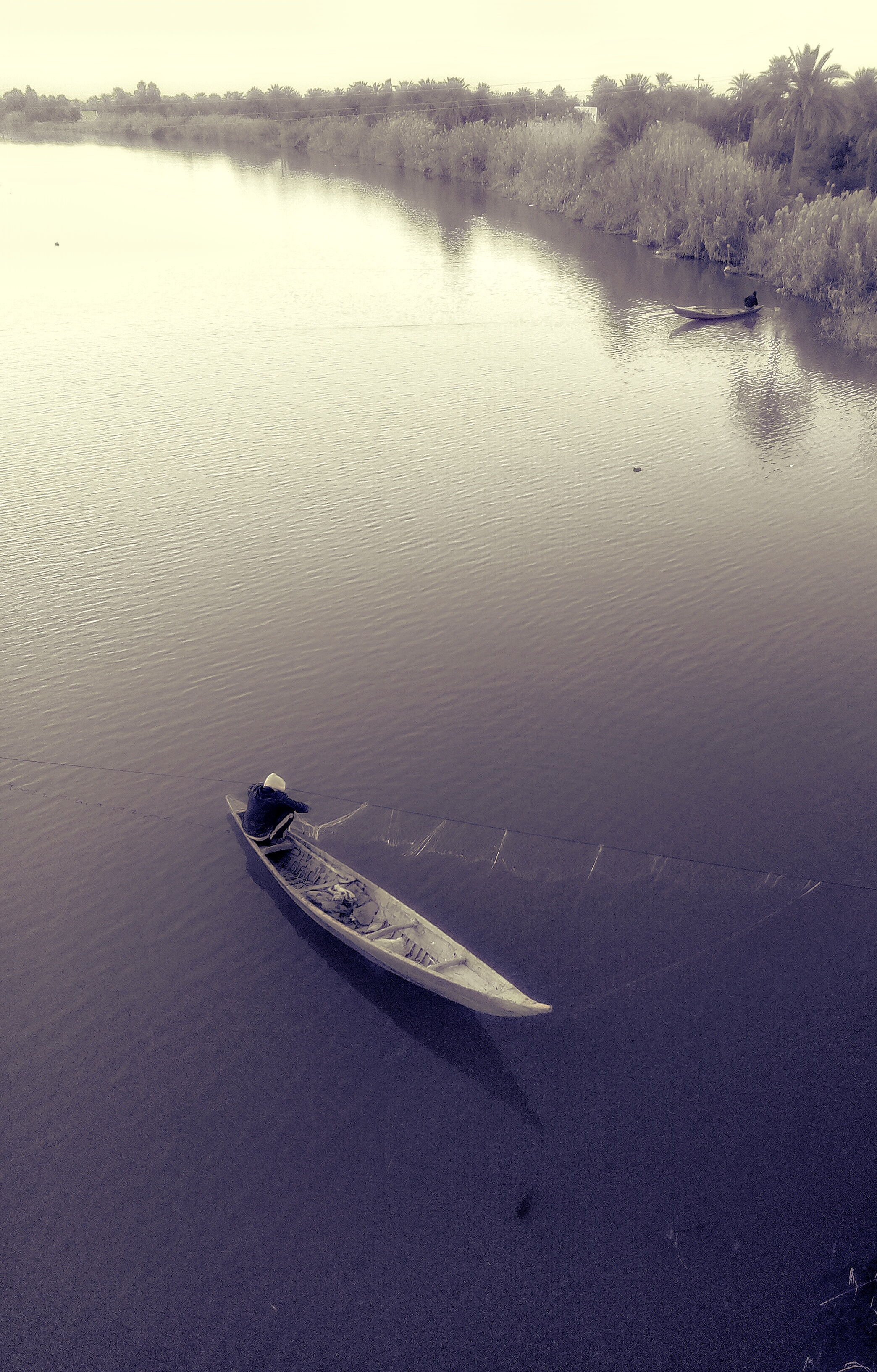 الشجرة التين والأغنام